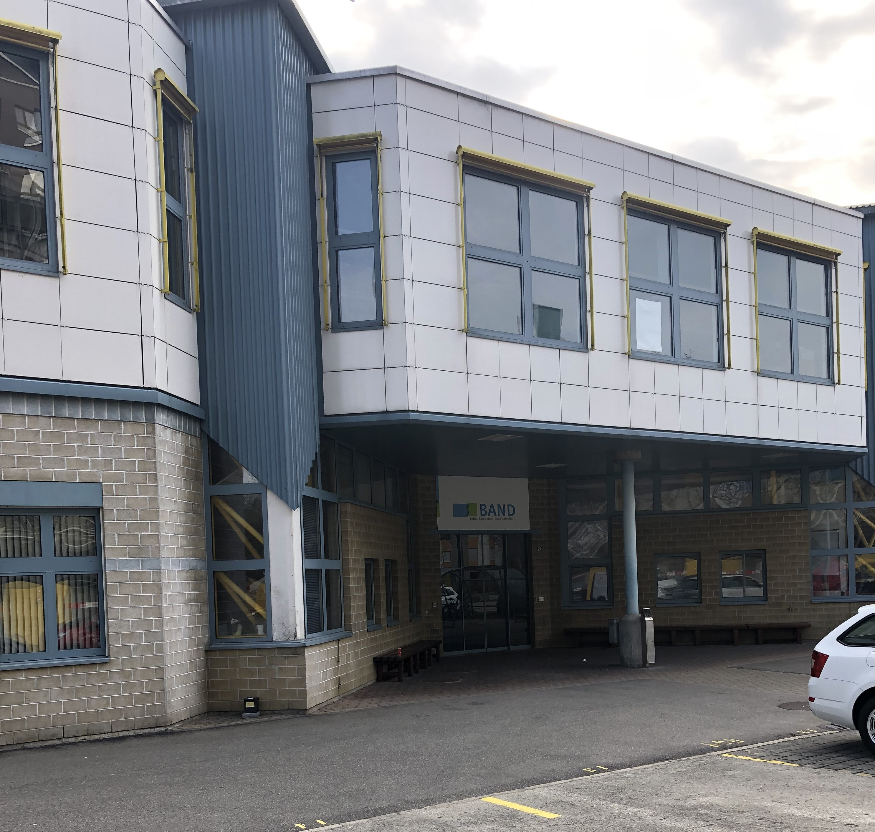 Holenacker BLICK Vorderansicht